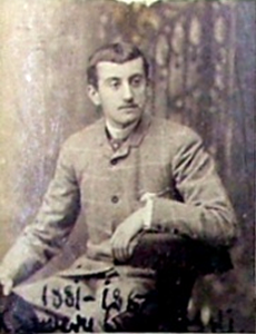 Ксаверы Арлоўскі (1862—1926) — сябра Дзяржаўнага савета Расійскай імперыі (1908—1910), пасол Польшчы ў Бразіліі і Іспаніі.